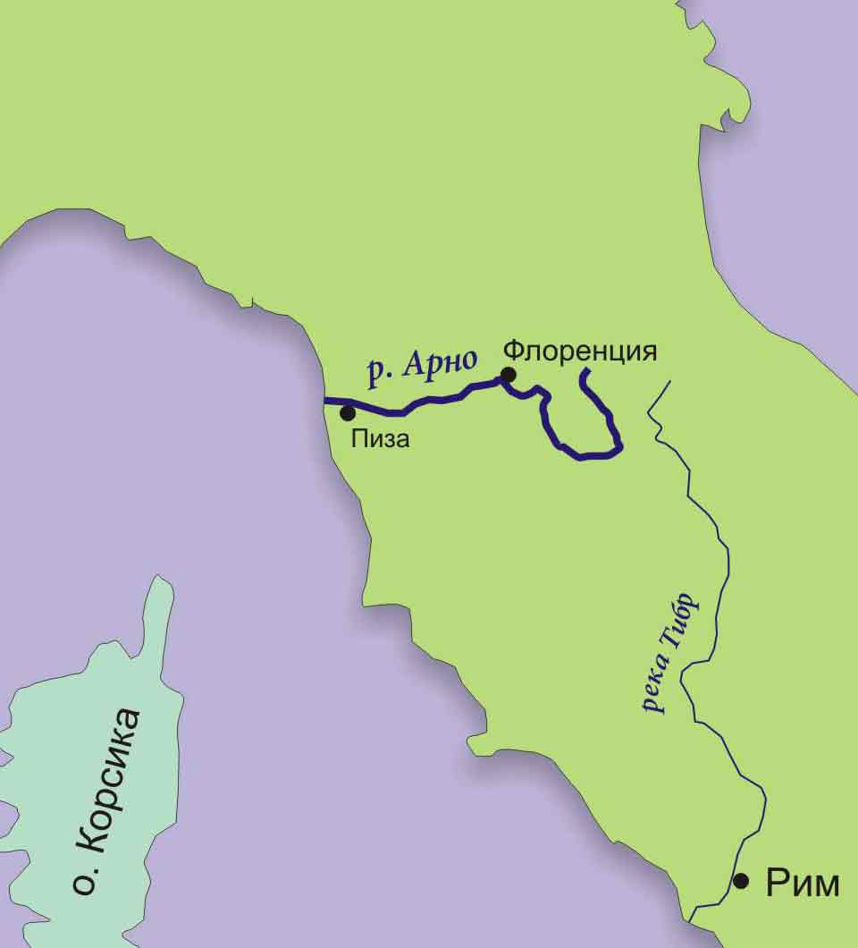 река Арно